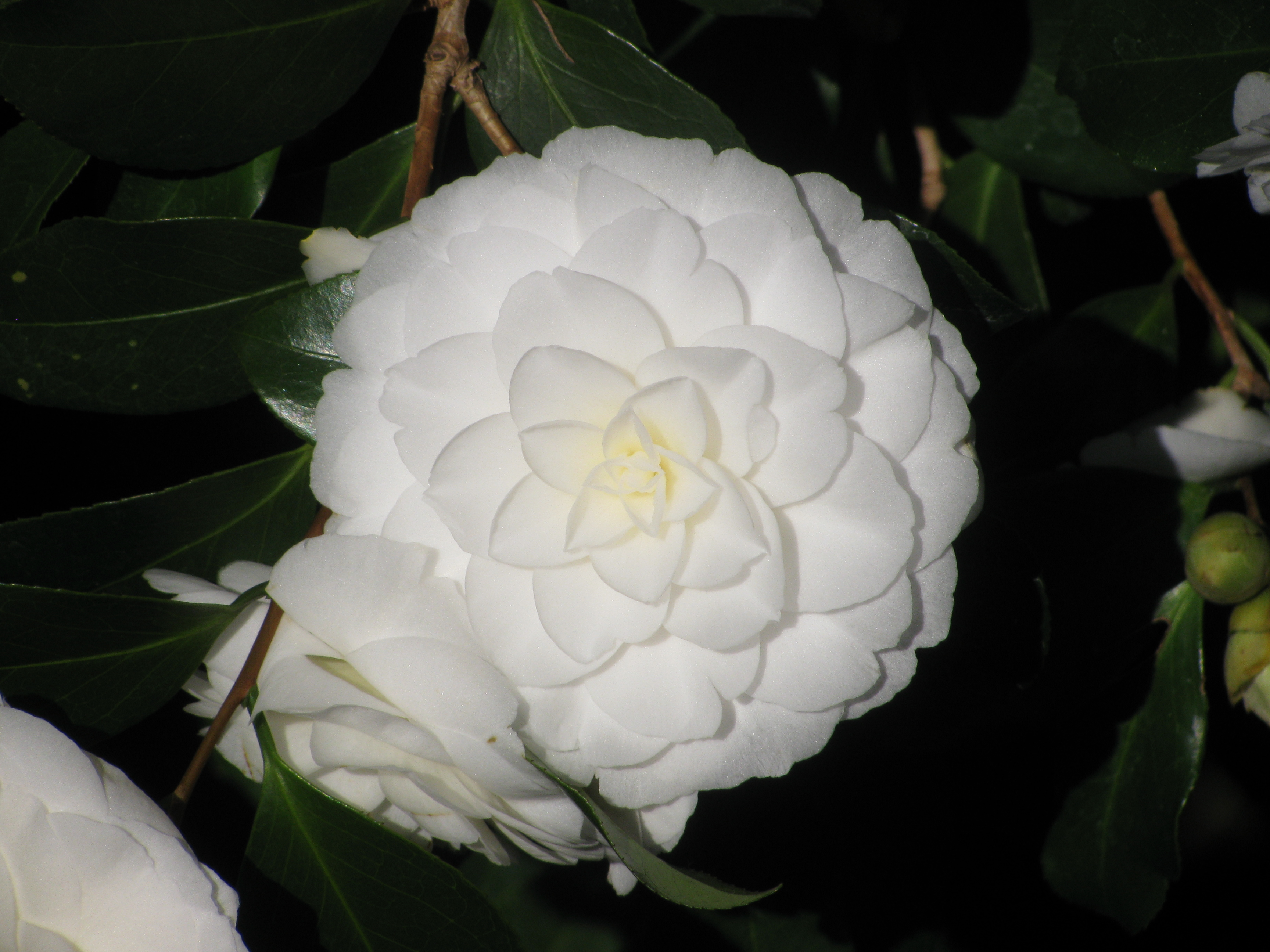 Camellia 'Alba Plena' in Königsbrück, Saxony